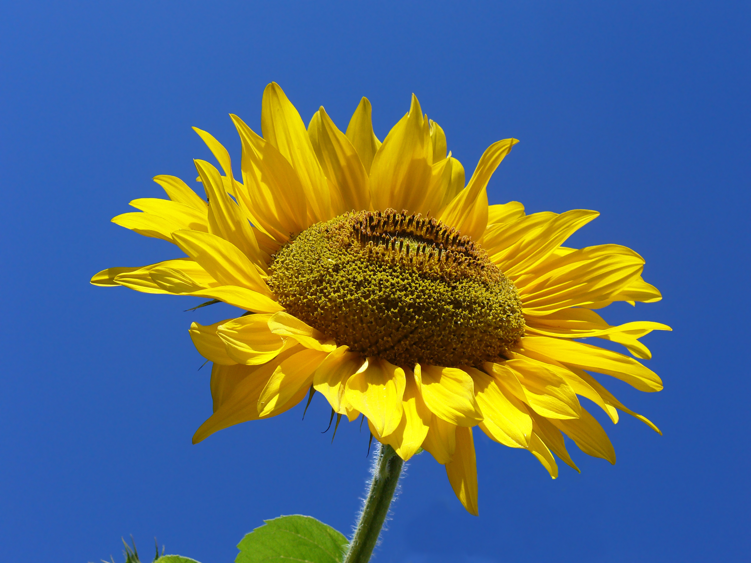 Sunflower (Helianthus L). Słonecznik